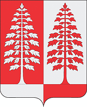 Герб Красноборского муниципального района (Архангельская область) This work is not an object of copyright according to article 1259 of Book IV of the Civil Code of the Russian Federation No. 230-FZ of December 18, 2006. Shall not be objects of copyright: official documents of state government agencies and local government agencies of municipal formations, including laws, other legal texts, judicial decisions, other materials of legislative, administrative and judicial character, official documents of international organizations, as well as their official translations; state symbols and signs (flags, emblems, orders, any forms of money, and the like), as well as symbols and signs of municipal formations; works of folk art (folklore), which don't have specific authors; news reports on events and facts, which have a purely informational character (daily news reports, television programs, transportation schedules, and the like). Comment – This license tag is also applicable to official documents, state symbols and signs of the Russian Soviet Federative Socialist Republic and the Union of Soviet Socialist Republics (union level[1]). Warning – This license tag is not applicable to drafts of official documents, proposed official symbols and signs, which can be copyrighted. Warning – This Russian official document, state symbol or sign (postage stamps, coins and banknotes mainly) may incorporate one or more works that can be copyrightable if separated from this document, symbol or sign. In such a case, this work is not an object of copyright if reused in its entirety but, at the same time, extracting specific portions from this work could constitute copyright infringement. For example, the denomination and country name must be preserved on postage stamps. ↑ Official documents, state symbols and signs of 14 other Soviet Republics are the subject of law of their legal successors. See respective license tags.